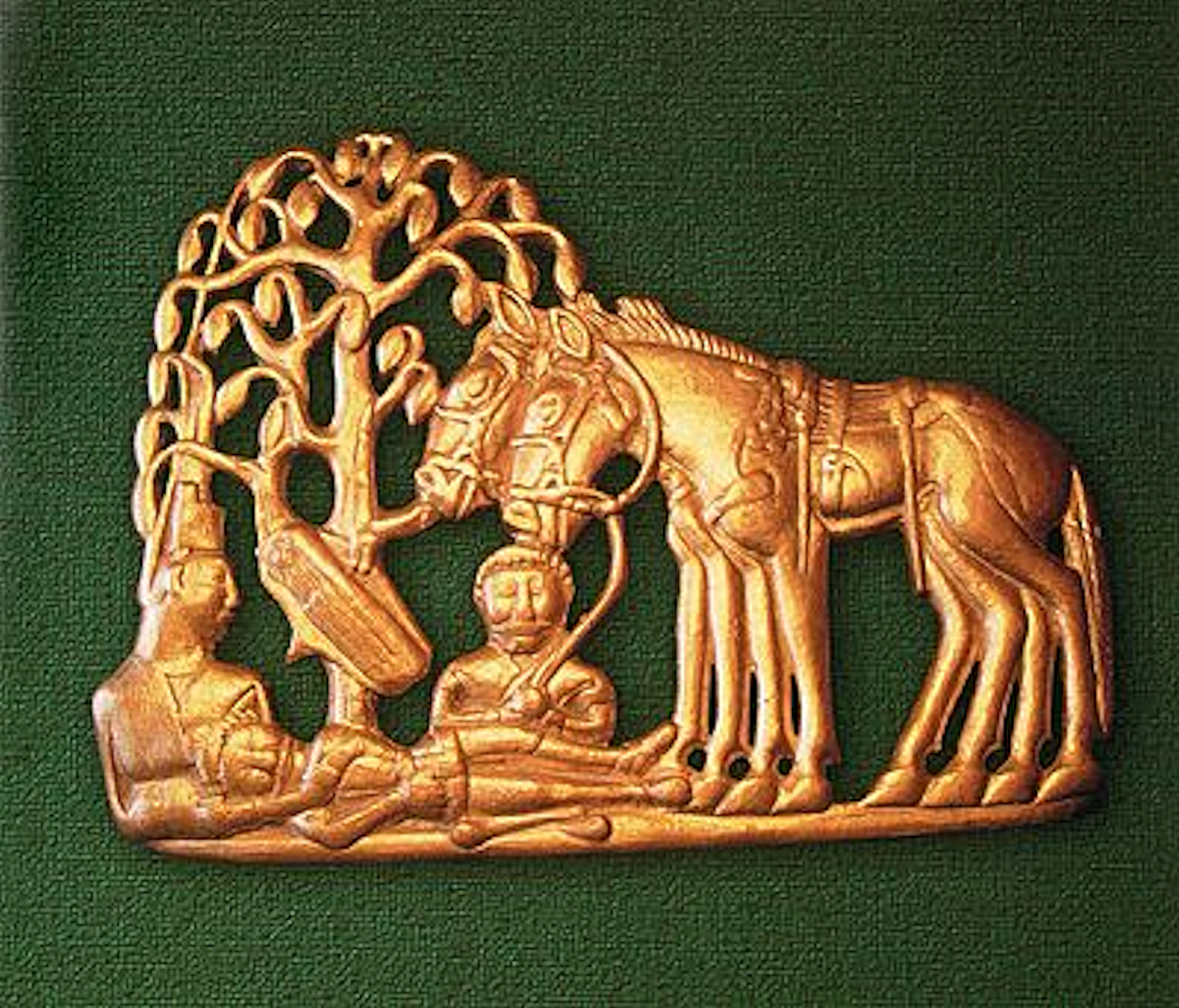 Золотое изделие из Ингальской долины